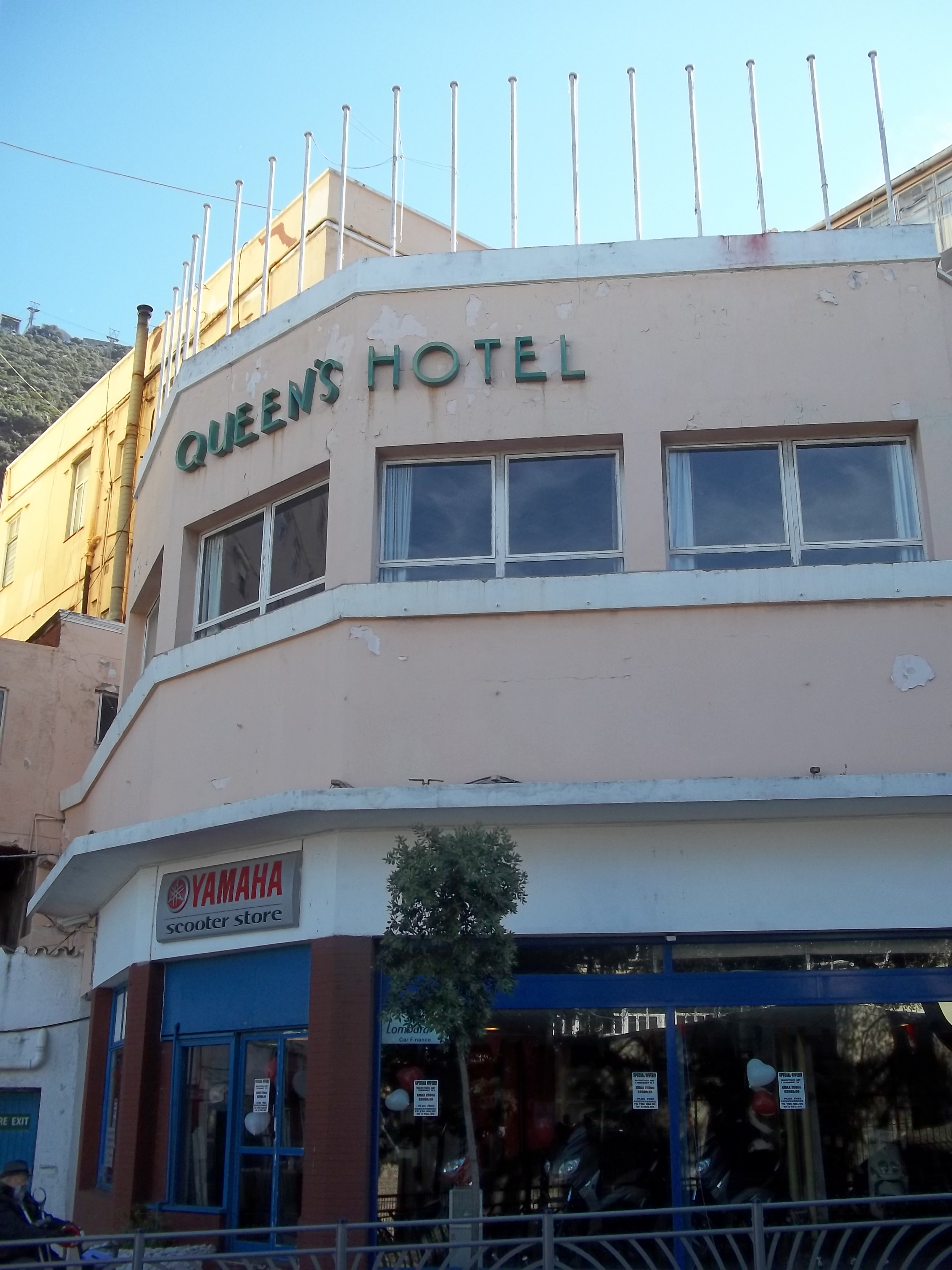 Gibraltar; Queens Hotel feb 2012